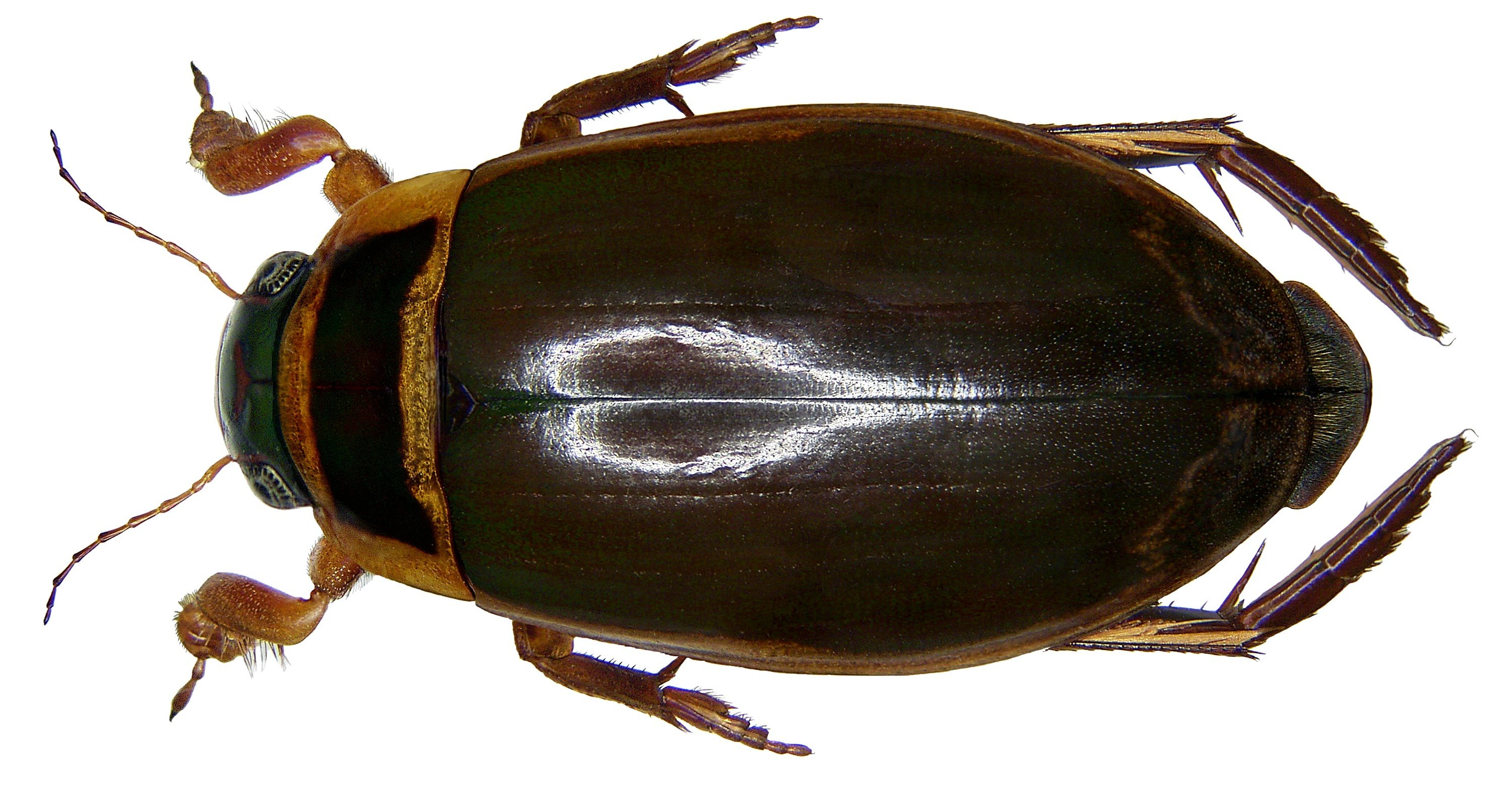 Dytiscus marginalis Linné, 1758 male Familie: Dytiscidae Grösse: 27-35 mm Verbreitung: Europa Fundort: Germania, Bayern, Oberfranken, Selbitz leg.det. U.Schmidt, 1971 Foto: U.Schmidt, 2008